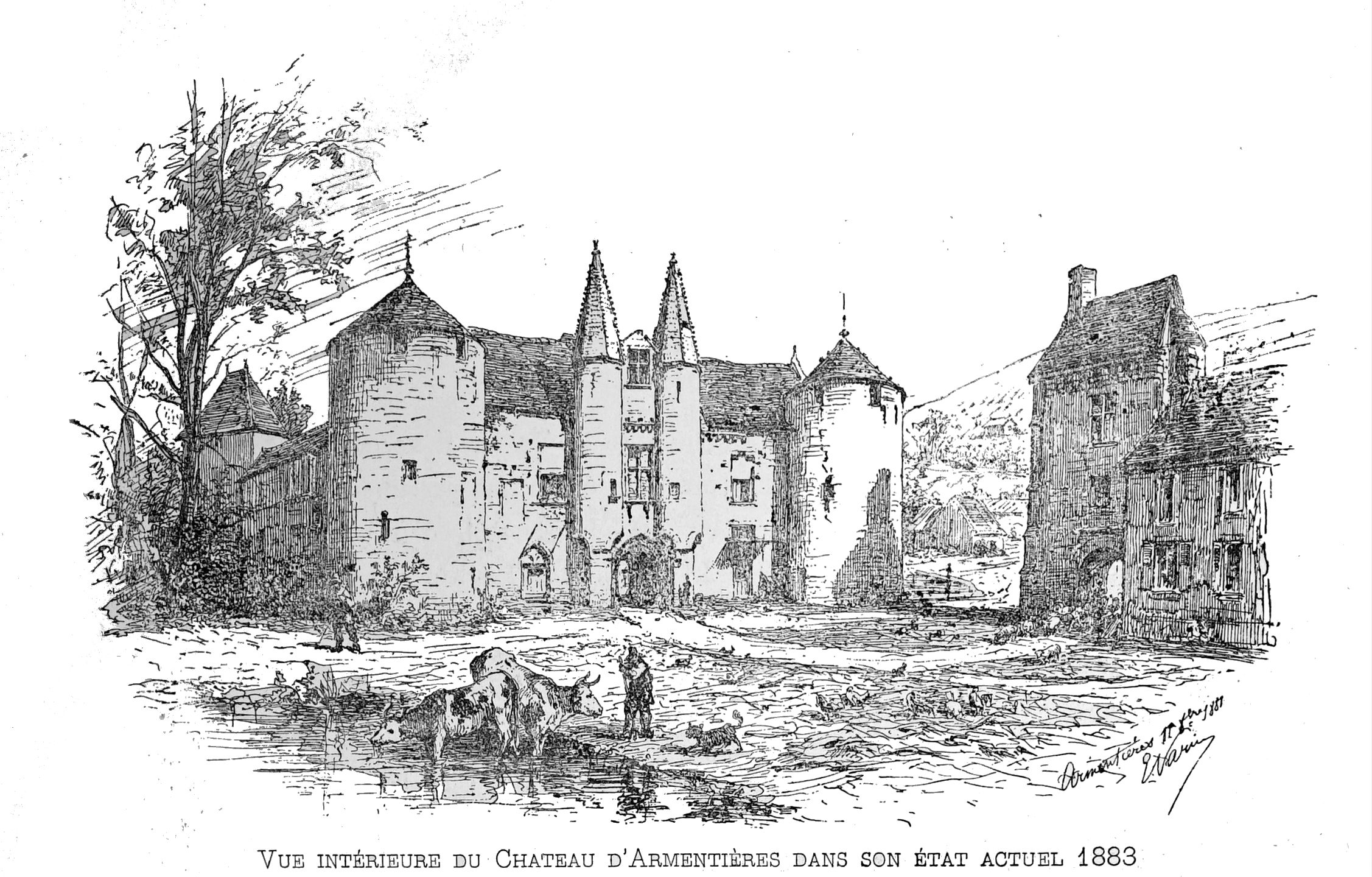 dessin de Pilloy des fouilles de Frédéric Moreau.